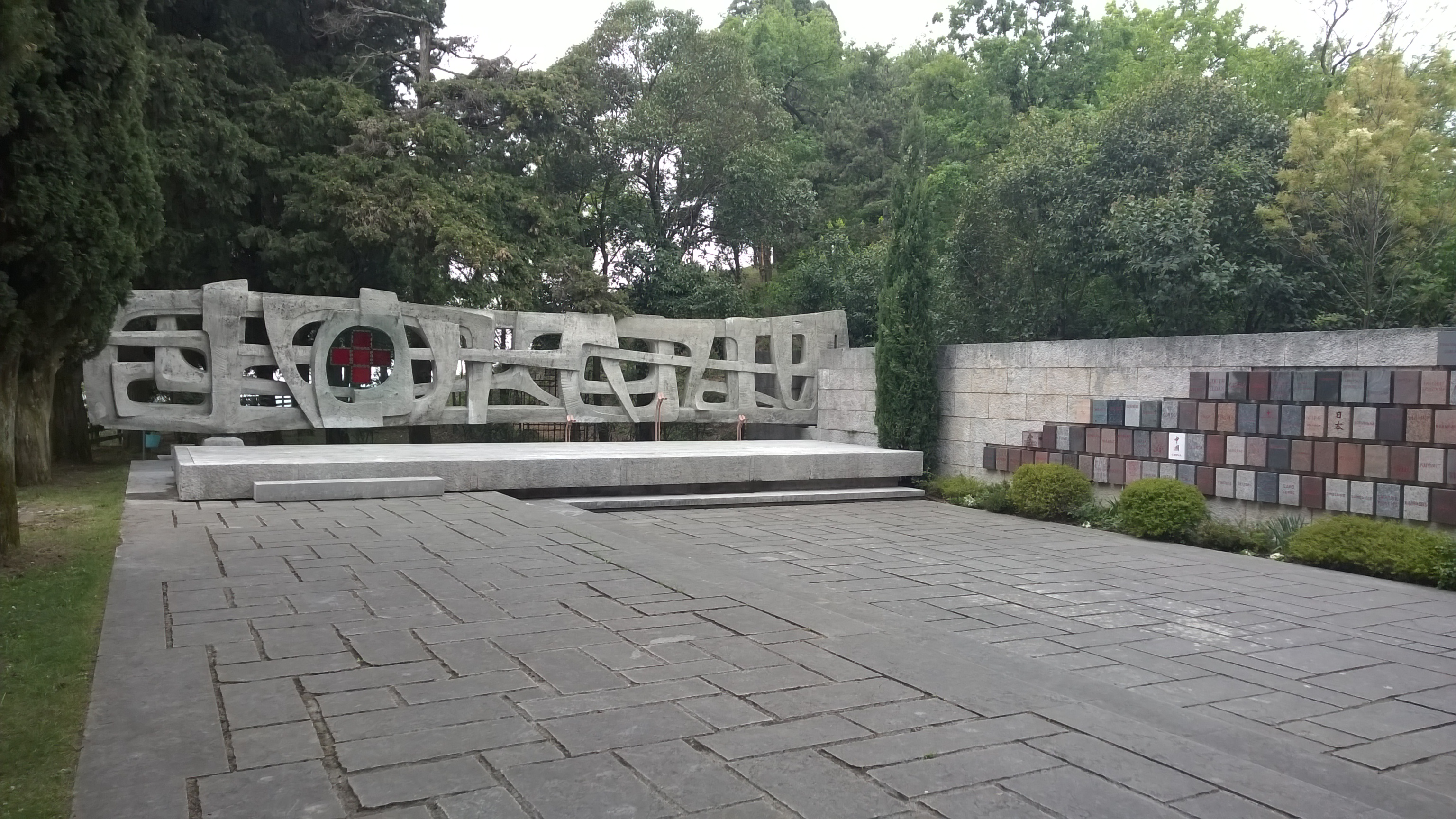 Monumento alla Croce Rossa Internazionale a Solferino in provincia di Mantova